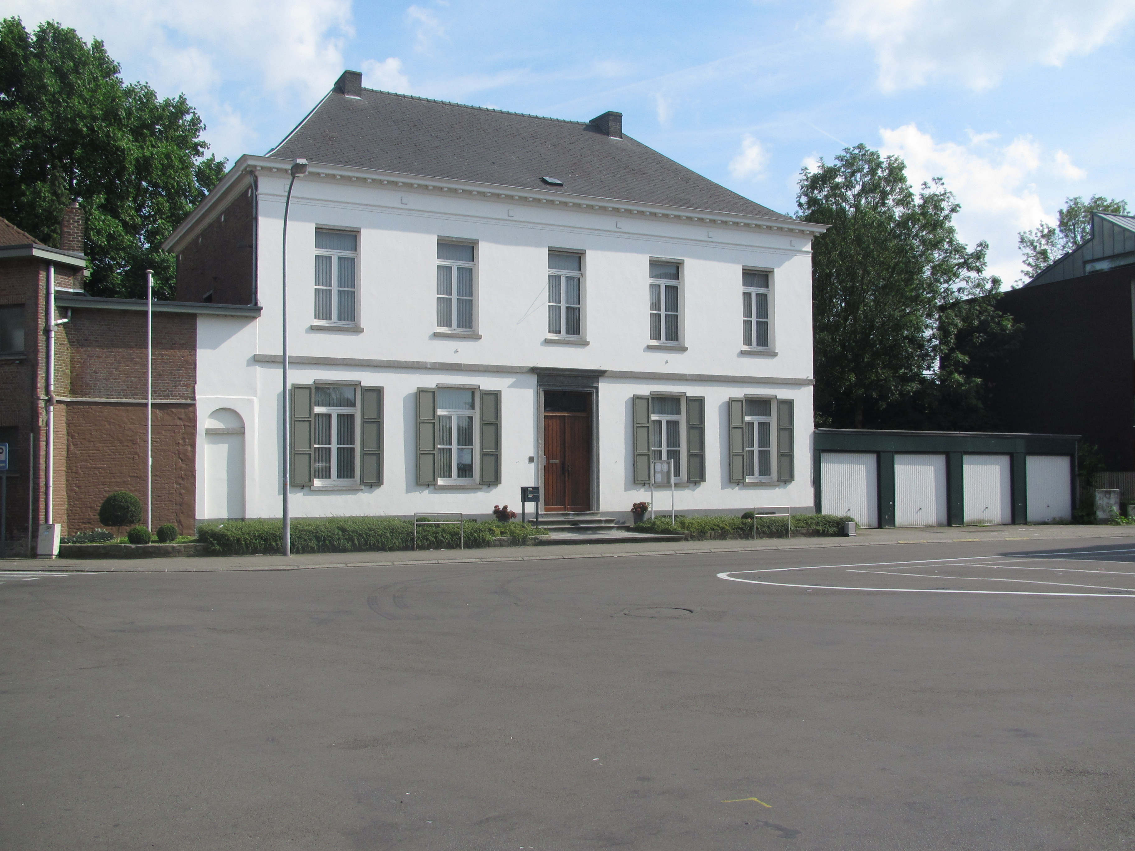 De pastorie van de Sint-Paulusparochie van Opwijk, gelegen aan de Singel. De apotheose van de Sint-Pauluspaardenprocessie met de zegening van de deelnemers vindt plaats op het plein voor de pastorie